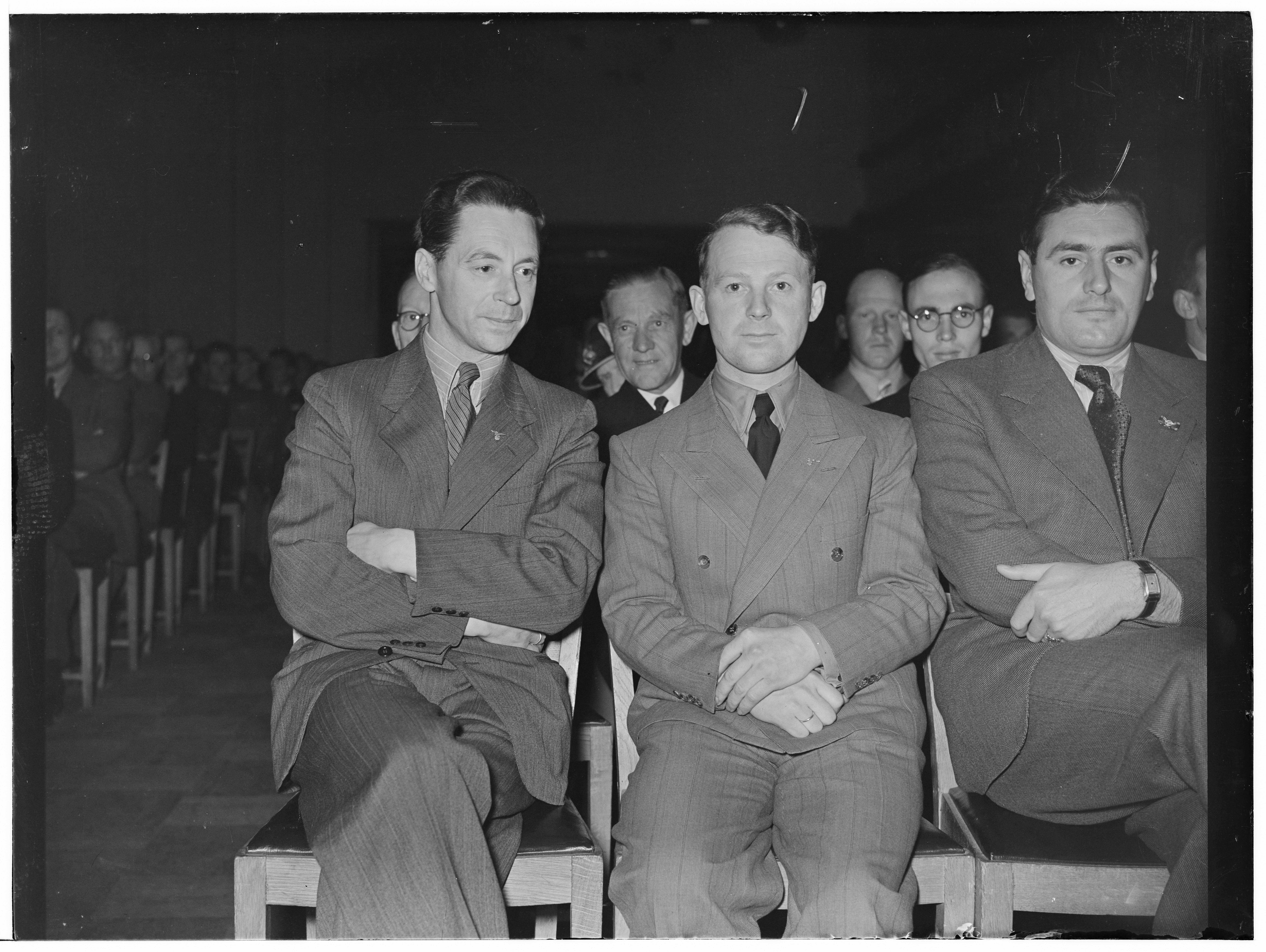 Nasjonal Samling. Fagorganisasjonens møte i Stortingsgt. 20. Foto trolig fra «N.S. faggruppeorganisasjons tillitsmannskursus» mandag 9. juni 1941 som omtalt i Aftenposten dagen etter. Ifølge NTBs reportasje foregikk møtet i festsalen i Stortingsgaten 20 kl. 20 («Det store lokale var fylt til trengsel av tillitsmenn fra hele landet.») Landsleder i N.S. F. O. Odd Fossum ønsket velkommen. Kveldens foredragsholder var «kst. statsråd dr. Gulbrand Lunde» som blant annet talte om «arbeidernes stilling i den nye stat“, «arbeidsløshetsproblemet» og «faggruppenes oppgaver». (Usikkert: Personen til høyre kan være Rolf Nilsen, propagandaleder i NS faggruppeorganisasjon, jamfør foto i Arbeiderbladet 1946.05.15 side 7)